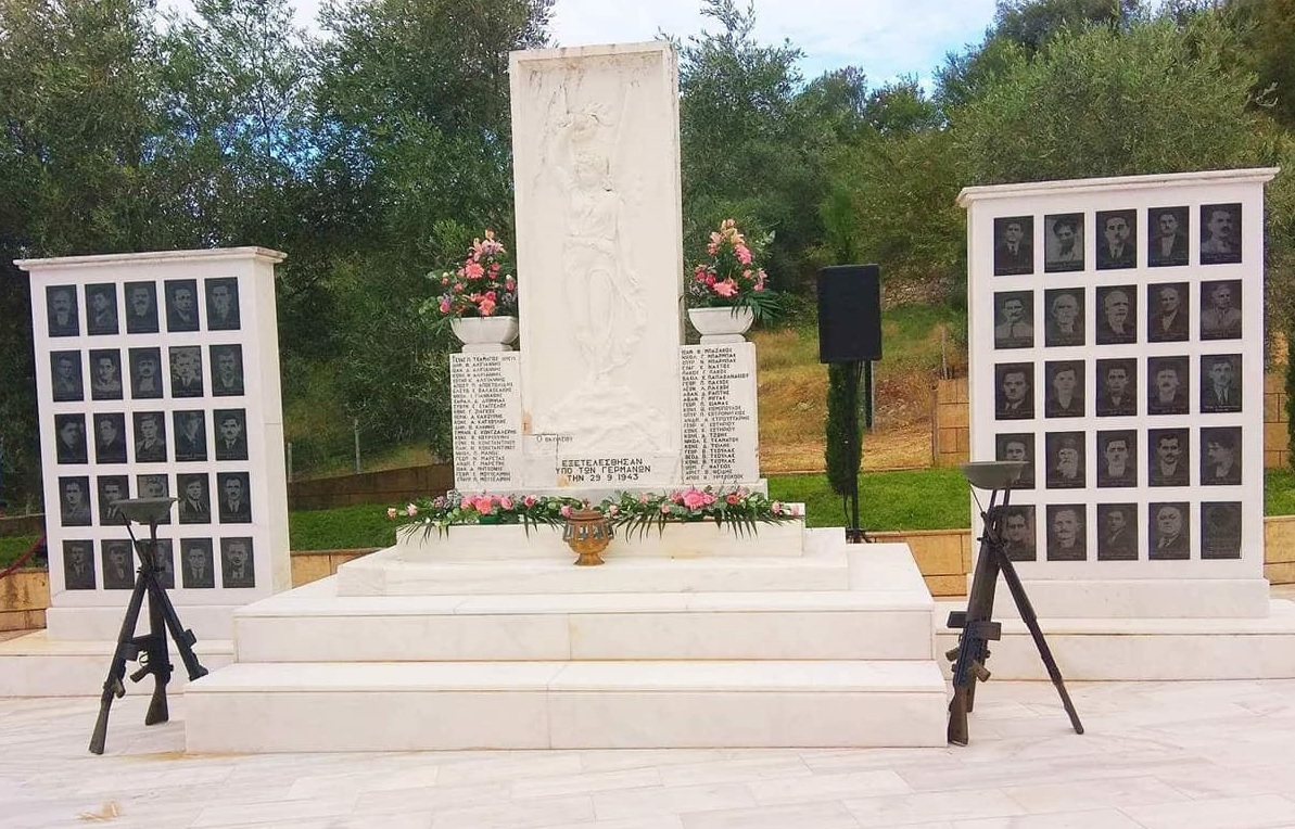 Monumento en memoria de los civiles fusilados por tropas nazis alemanas y albanesas en Paramythia